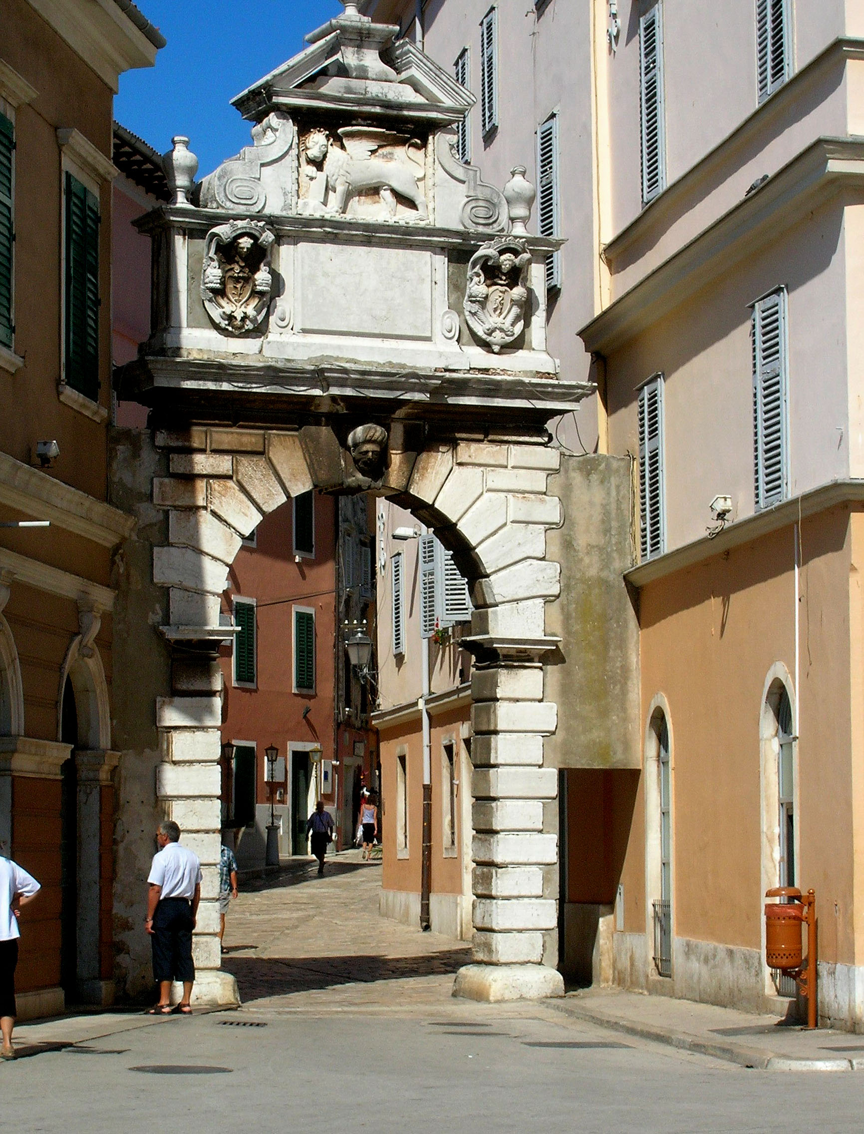 Stadportal zu Rovinj